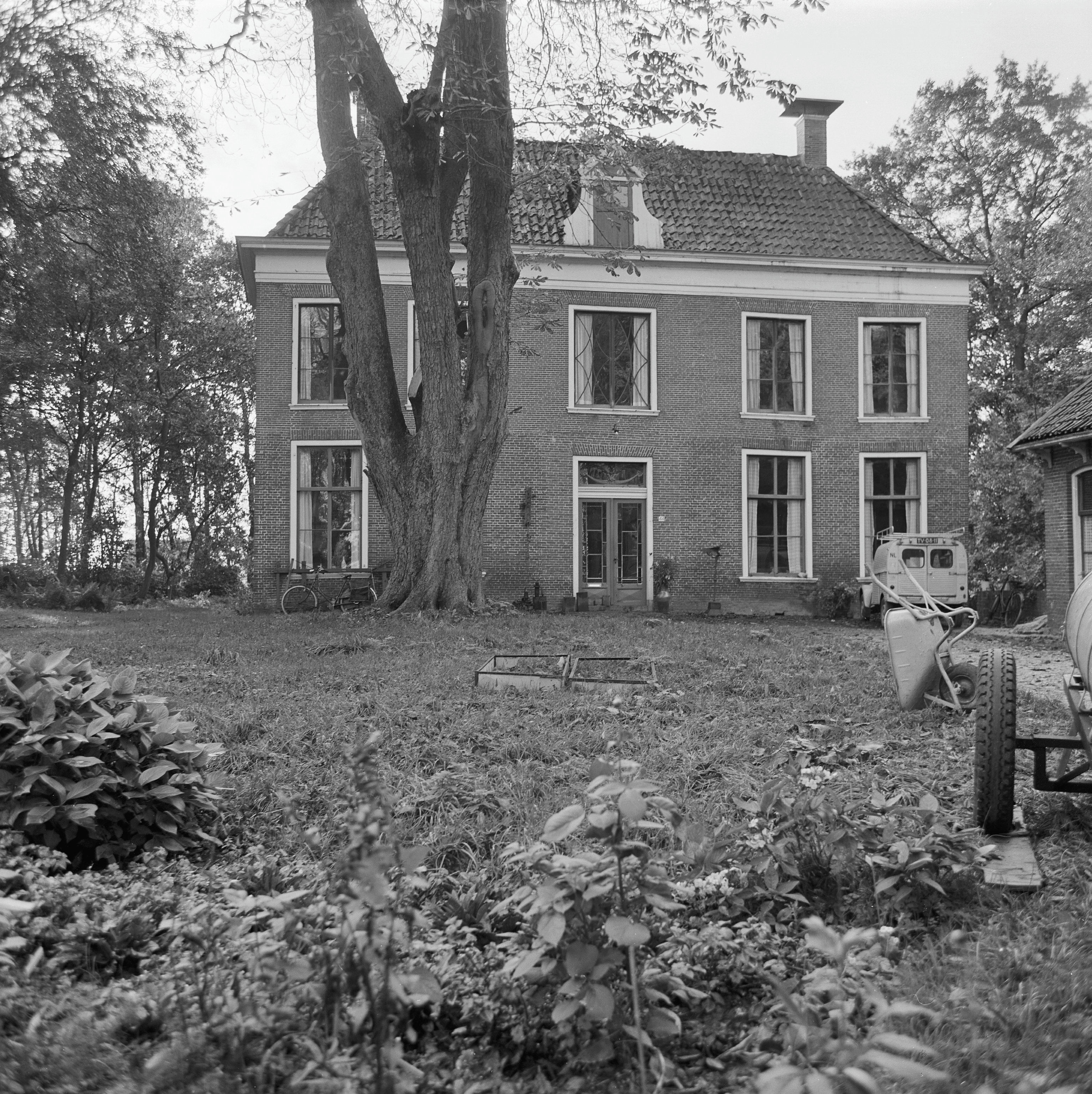 Allersmaborg: Zicht op de voorzijde